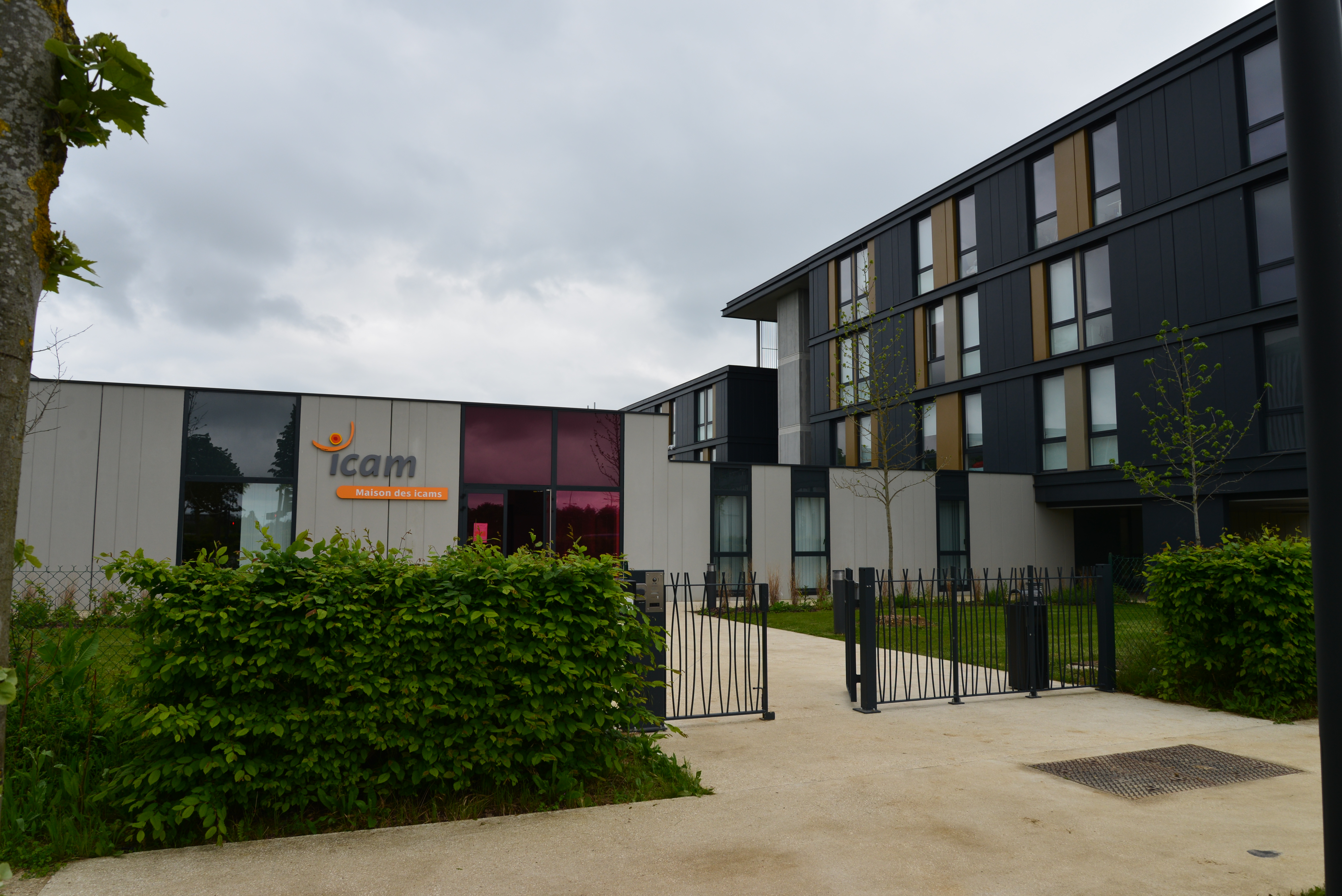 Vue de la "Maison des ICAM", la résidence universitaire de l'ICAM de Paris-Sénart à Lieusaint / Seine-et-Marne / France --- Foyer des Etudiants de l'Institut Catholique des Arts et Métiers (ICAM) de Paris Sénart.